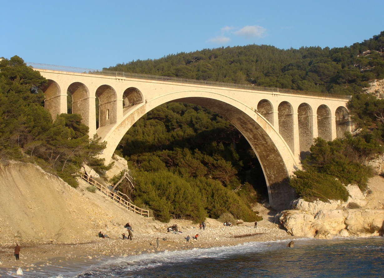 Le Viaduc des Eaux-salées, sur la ligne de la Côte bleue, vue d'ensemble côté mer.